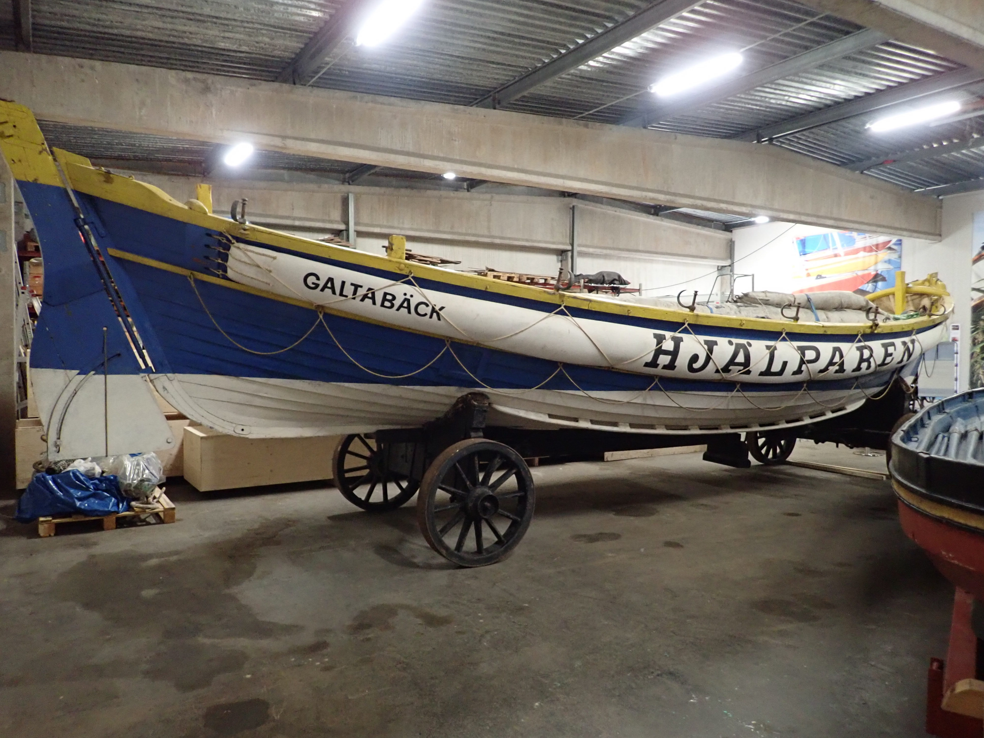 Räddningsbåt Hjälparen i Sjöhistoriska museets båtmagasin på Rindö, den 14 september 2019